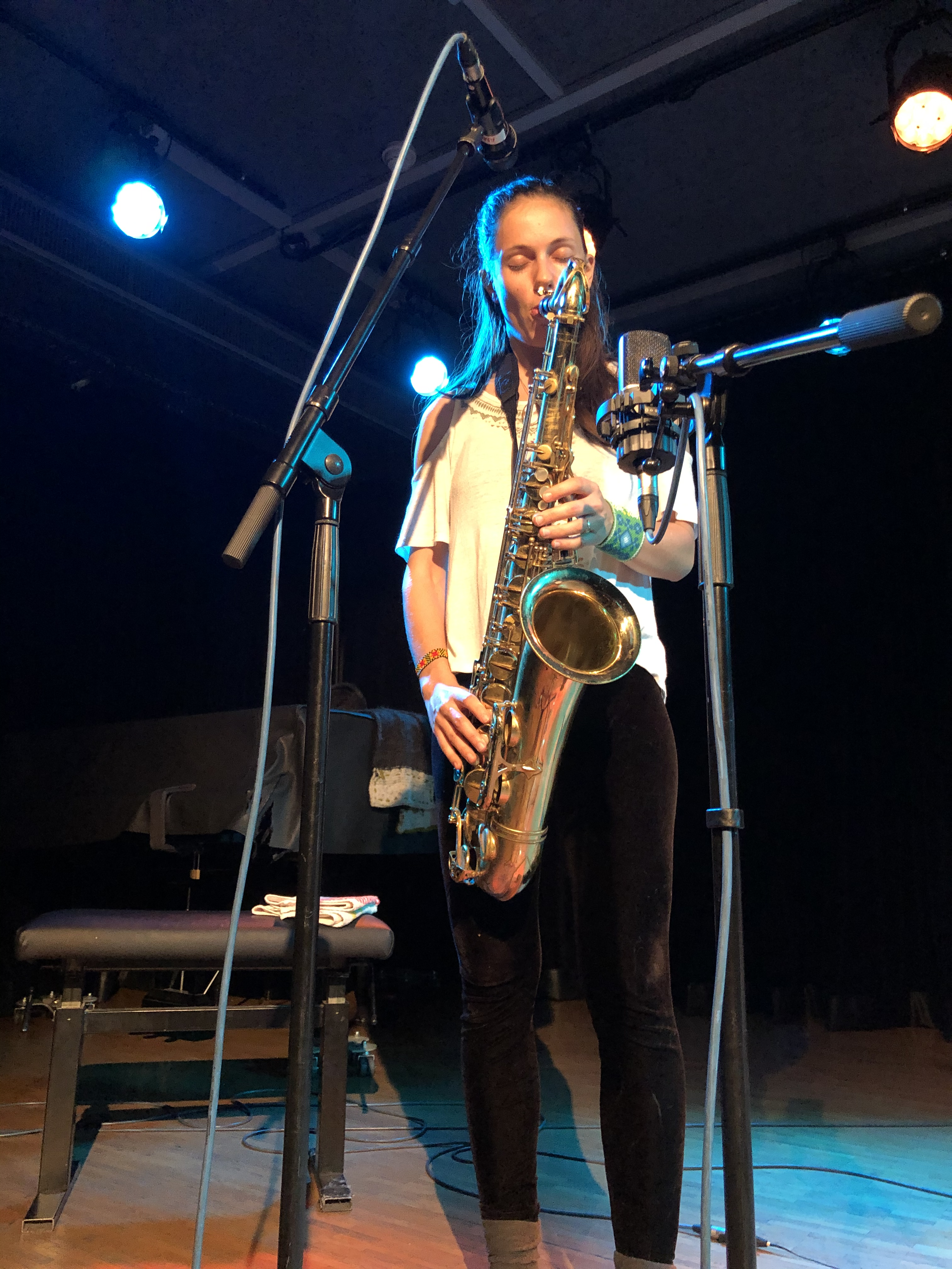 Maria Grand en concert à l’AMR le 8 novembre 2019 avec le Maria Grand Trio (Savannah Harris à la batterie et Kanoa Mendenhall à la basse)